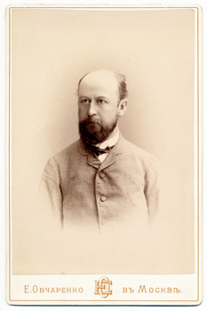 Виктор Александрович Гольцев (работа Е.Овчаренко, Москва)